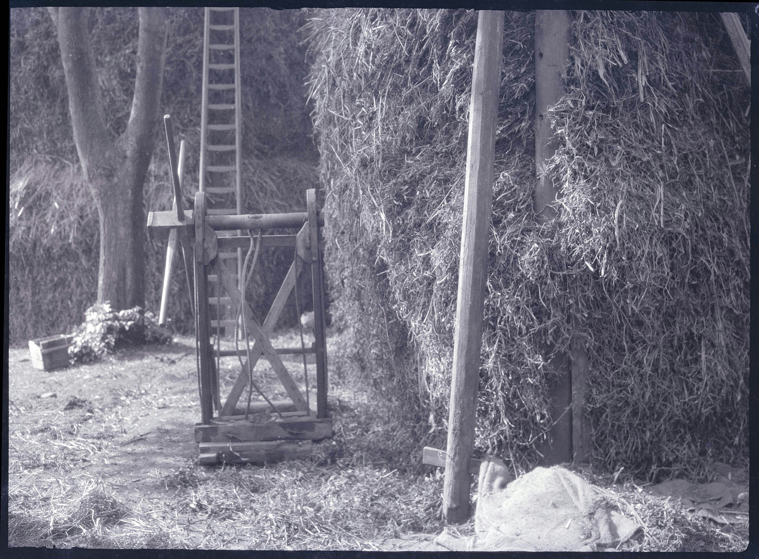 Boerderij "Jagtlust": Hooiberg met mechanisme (opmerking: Klaas Uilkema onderzocht deze boerderij op 18 september 1924) This is a possible Rijksmonument: Find the monument in the Monuments database: Noordeinde 130 in Noordeinde All Rijksmonumenten in Noordeinde Is this a Rijksmonument? Yes No More information about this project and help. More images to work at in Category:Possible Rijksmonumenten.